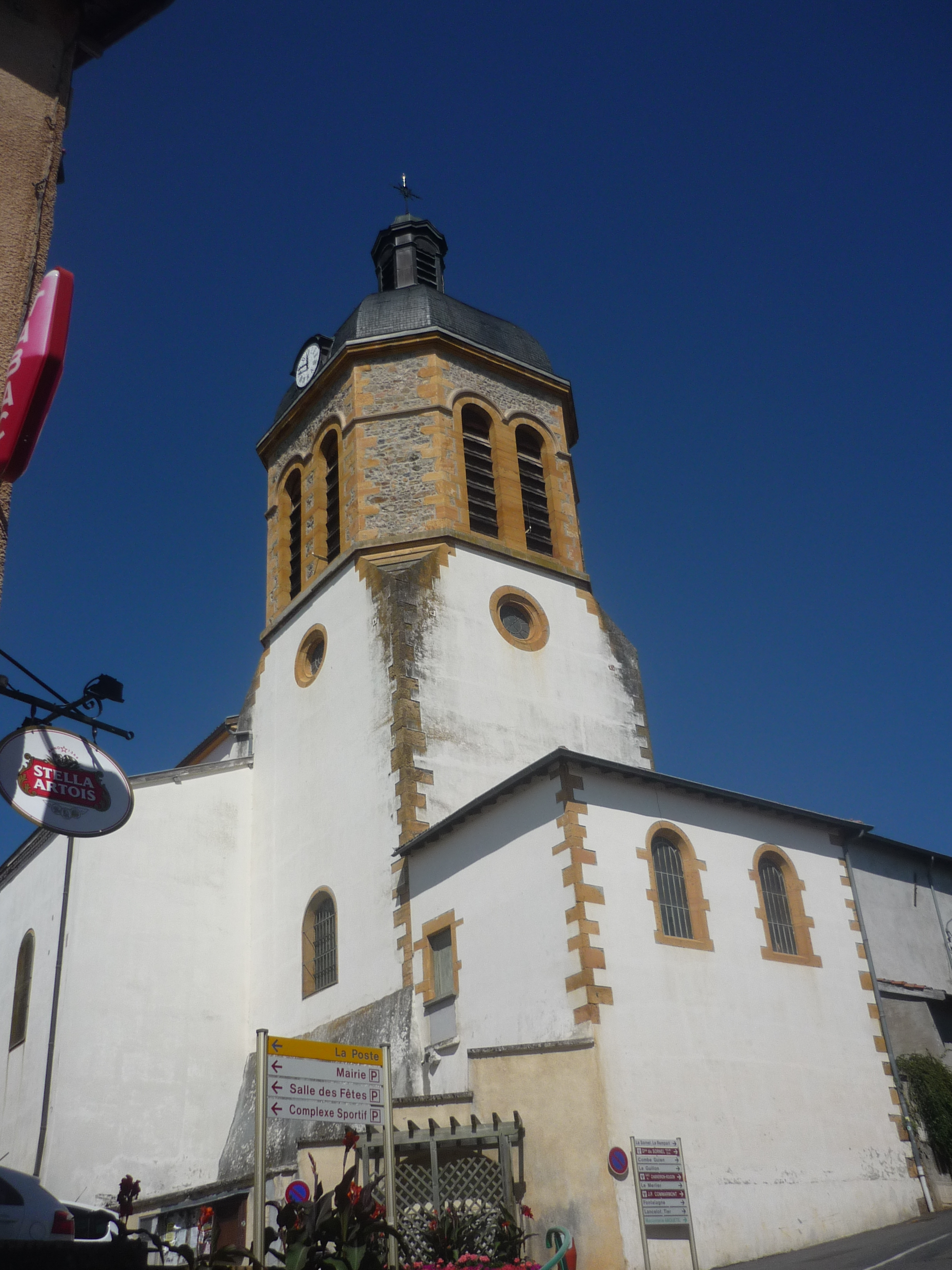 Église de la commune de Létra, dans le département du Rhône en France.